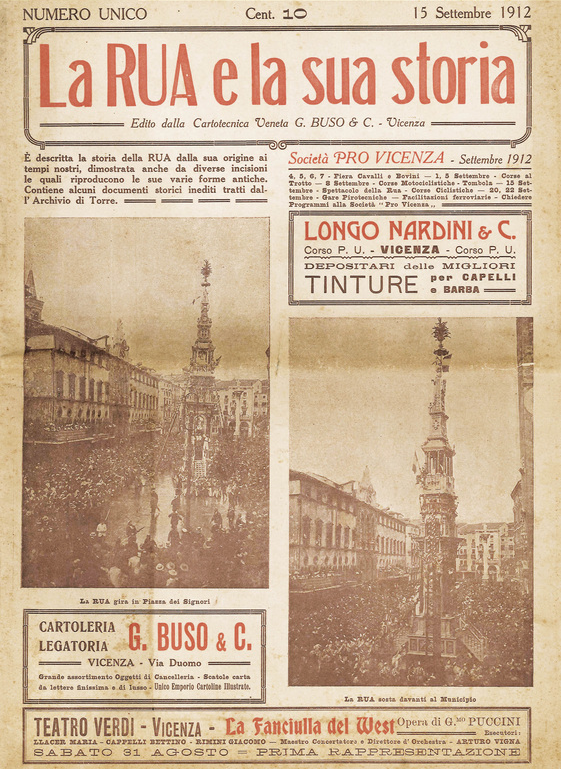 Opuscolo La Rua e la sua storia, Vicenza, 15 settembre 1912.